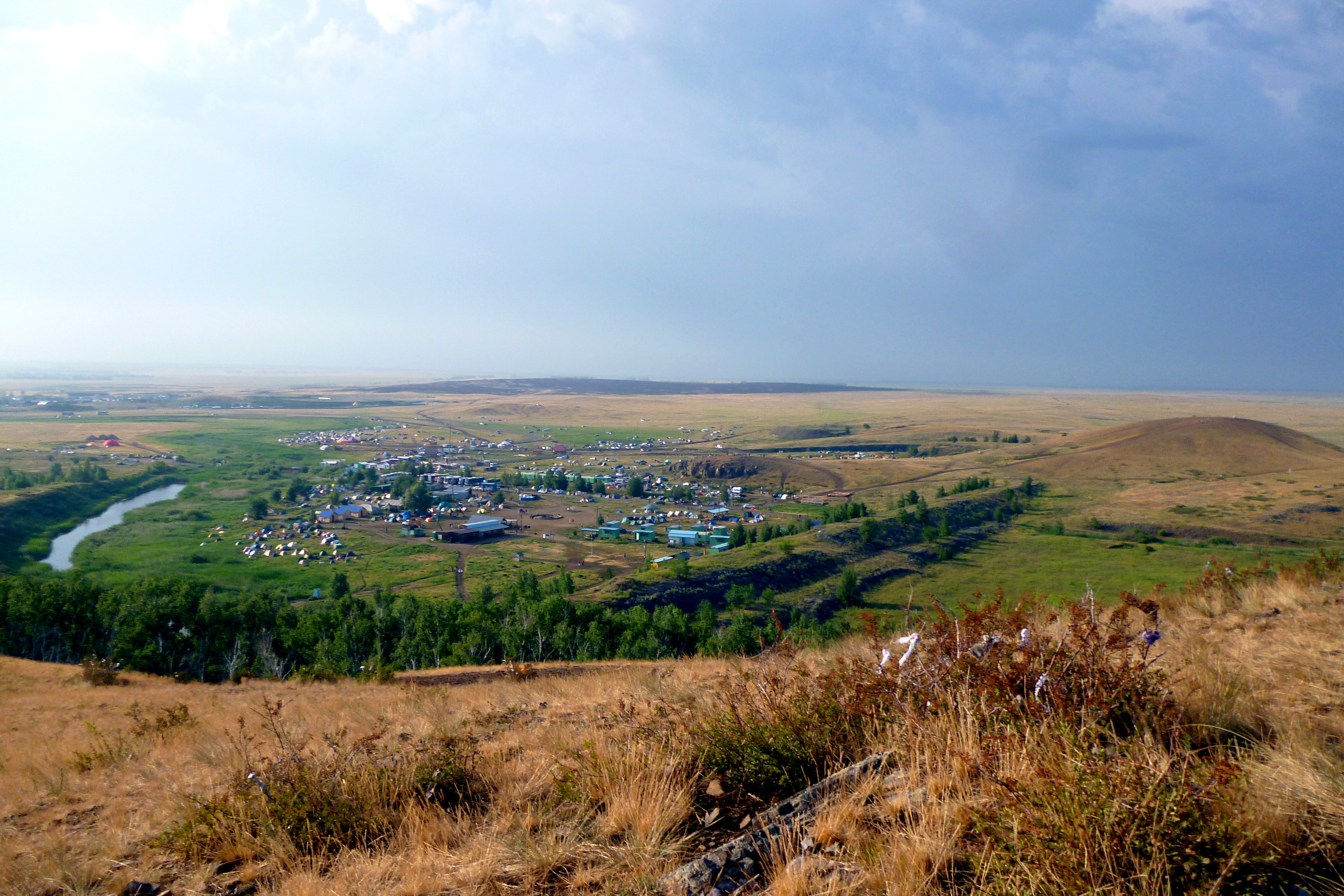 Аркаим: Брединский район Челябинской области, недалеко от слияния речек Большая Карагачка и Утяганка,Аркаим,Брединский район, Челябинская область This image is related to the protected area of Russia number 7410044